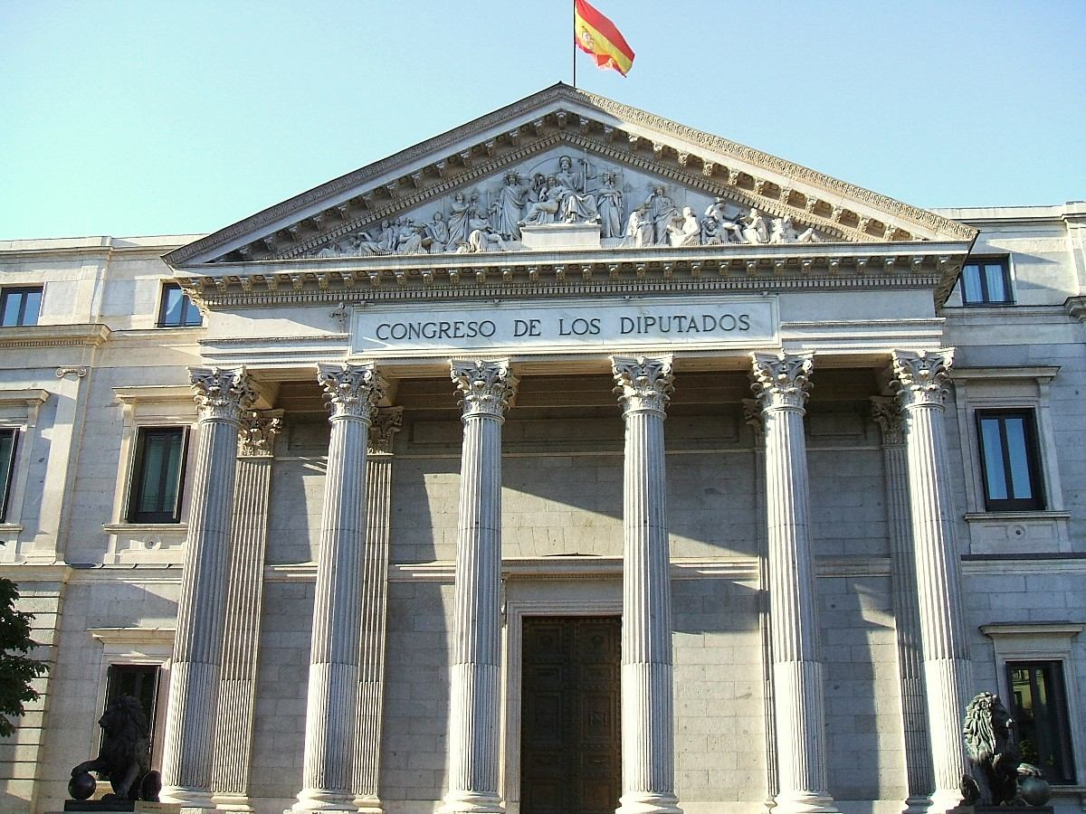 Palacio del Congreso de los Diputados, Madrid.